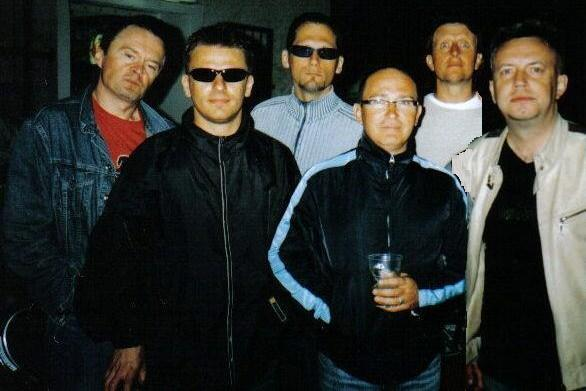 De Mono.